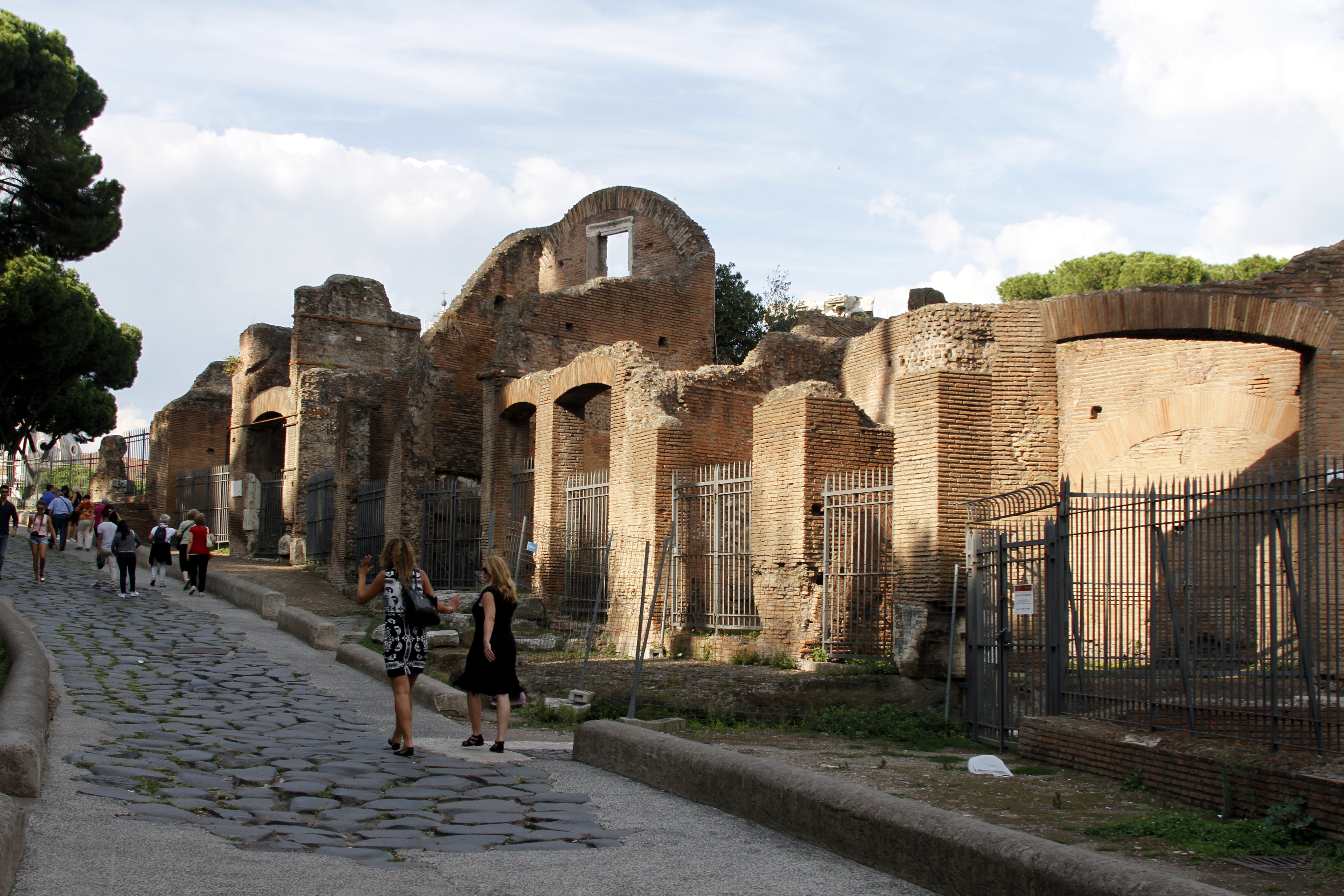 Clivus Argentarius and Basilica Argentaria - Rome